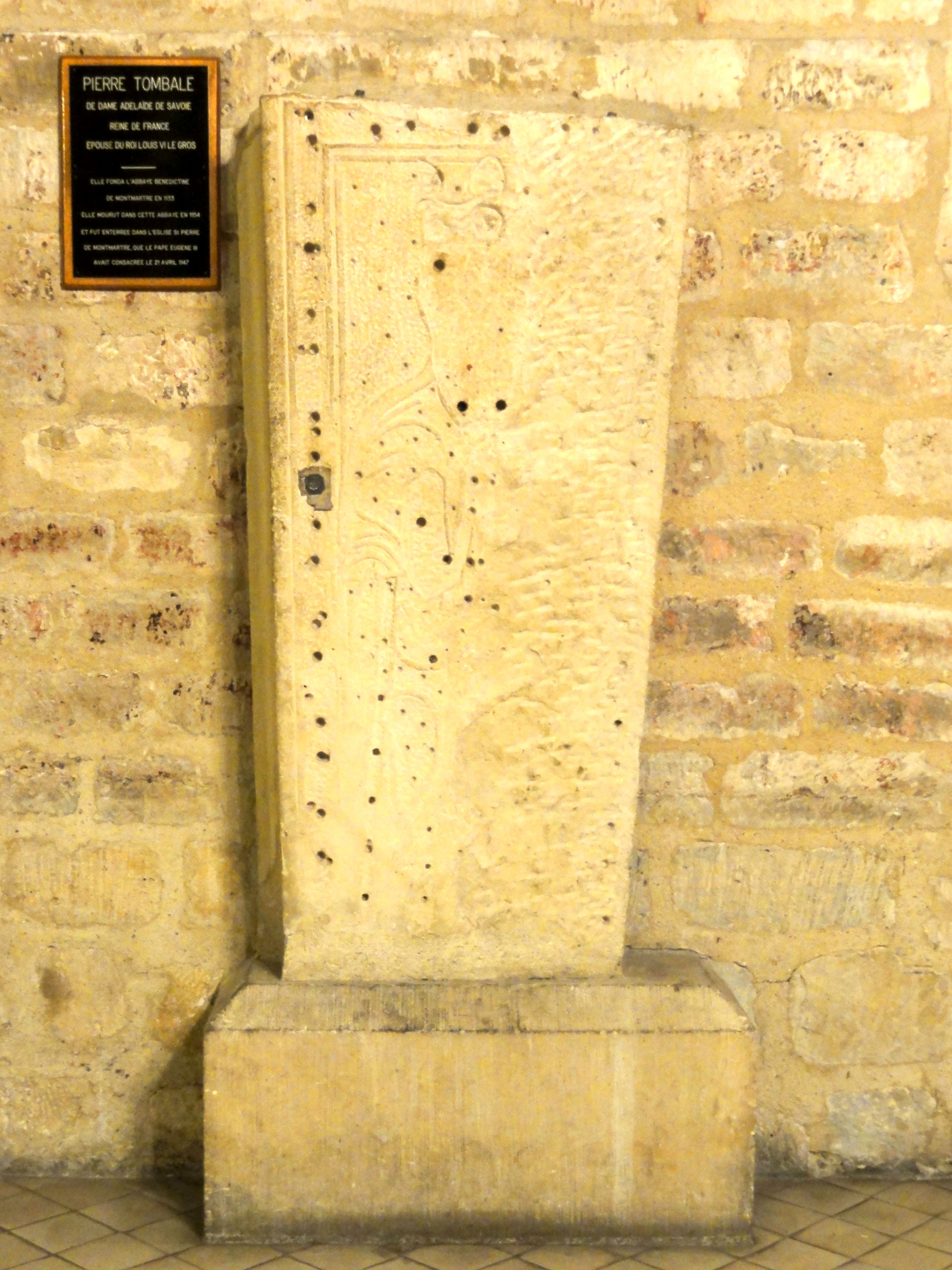 Bas-côté nord, pierre tombale d'Adelaïde de Savoie, morte en 1154.